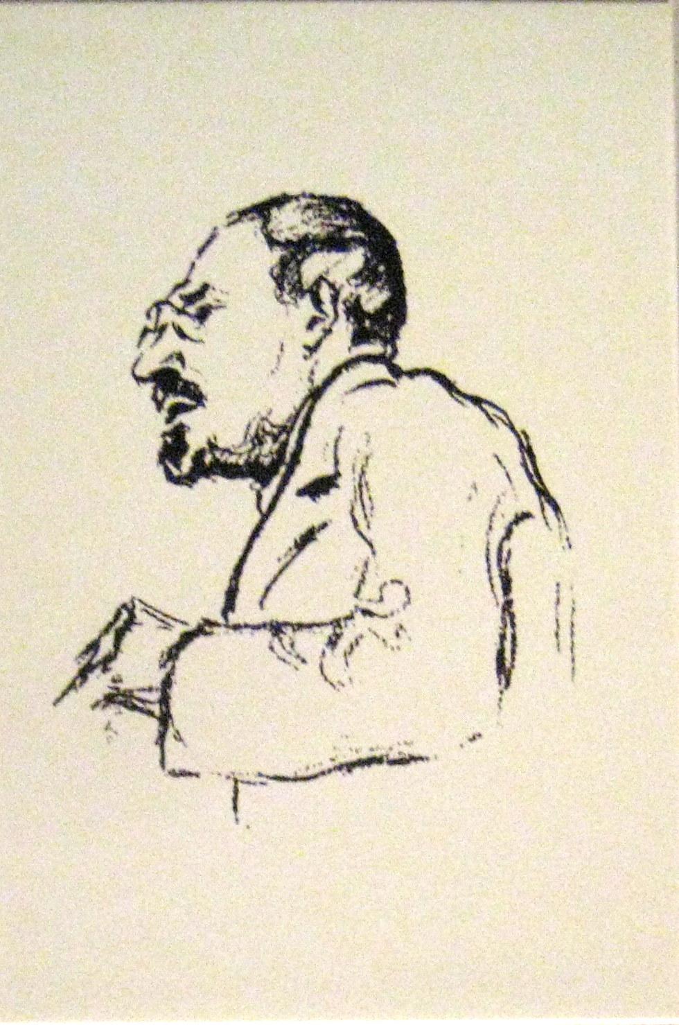 Ю.К. Арцыбушев. Портреты политических деятелей. Москва, 14 августа 1917. ГИМ. Зарисовки с натуры, выполненные во время Государственного совещания в Москве, были опубликованы в издательстве Д.Я. Маковского